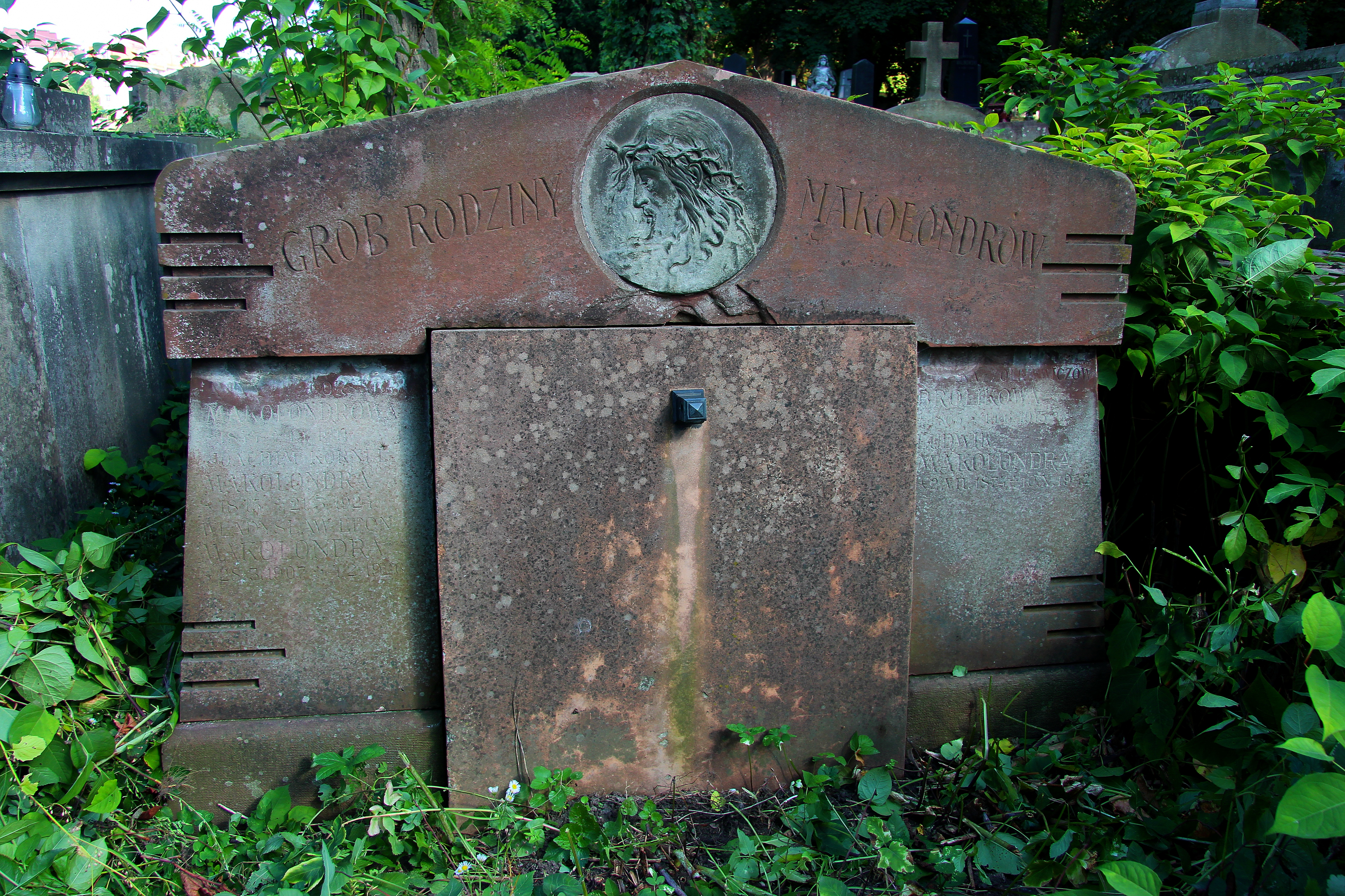 Гробівець сімї Л. Макольондри.